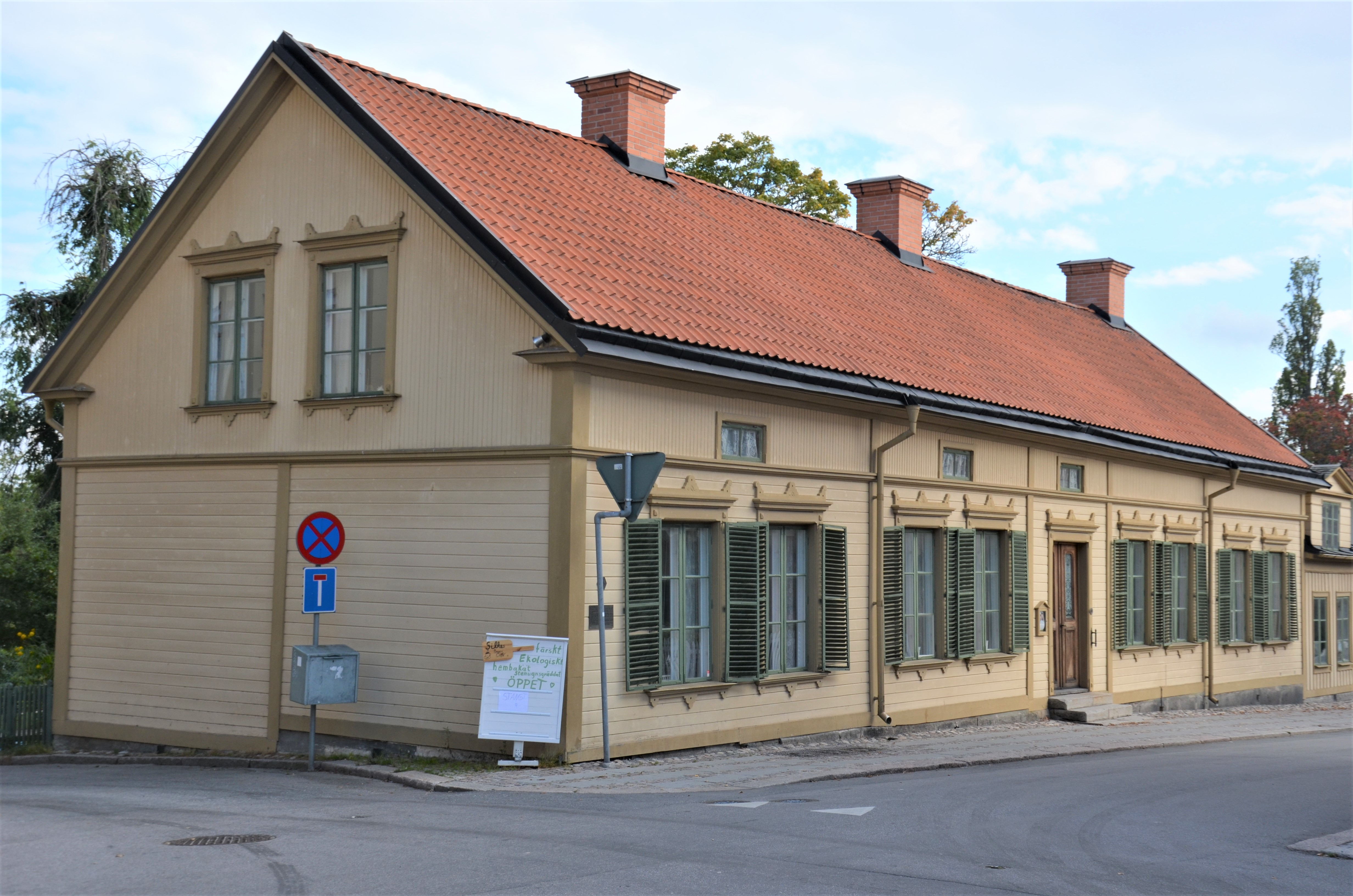 Göthlinska gården i Nora kommun,Örebro län It is not clear whether freedom of panorama applies to this image. This is a depiction of a building in Sweden. The depicted work is believed to be protected by copyright. According to Article 24 of the Swedish copyright act, "Works of art may be depicted if they are permanently placed on or at a public place outdoors. Buildings may be freely depicted." It has been widely accepted that this provision made distribution of depictions such as this one legal. On 4 April 2016, however, the Supreme Court of Sweden issued a statement that the first paragraph in Article 24 does not extend to publication in online repositories, and on 6 July 2017, a lower court ruled that linking to depictions of copyrighted artworks hosted on Commons in a database constitutes copyright infringement. See COM:CRT/Sweden#Freedom of panorama for more information. The second paragraph in the article, about buildings, was not evaluated in the statement or ruling. The implications of these decisions on Commons' ability to continue to distribute this and other depictions like it are currently under analysis. Reusing or linking to this file can have legal consequences, unless if the artist has died before 1 Jan 1950, to which either PD-Sweden-photo or PD-old-70 may applied. You are solely responsible for ensuring that you do not infringe the copyright belonging to someone else. See our general disclaimer for more information.